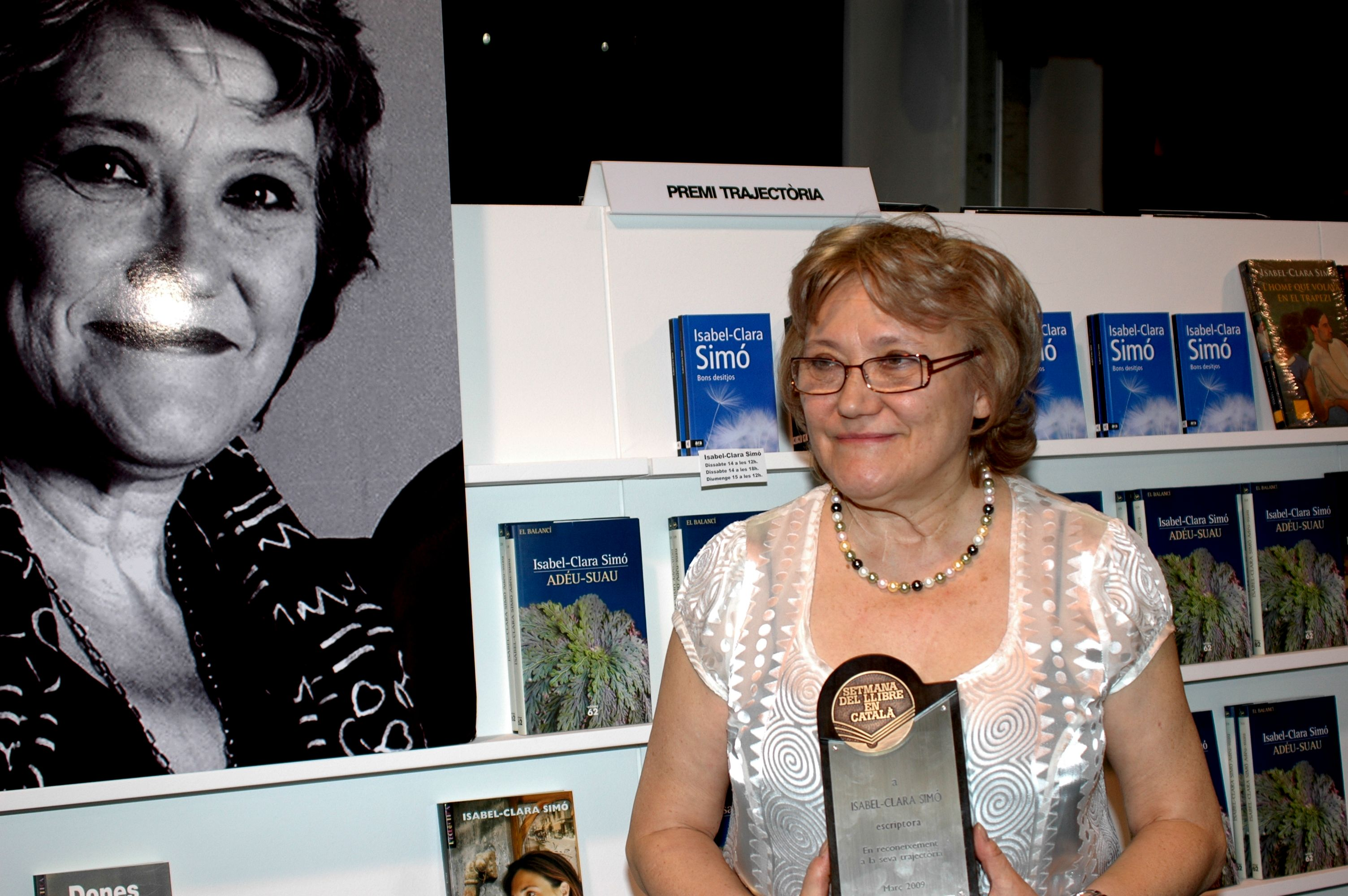 Isabel-Clara Simó i Monllor